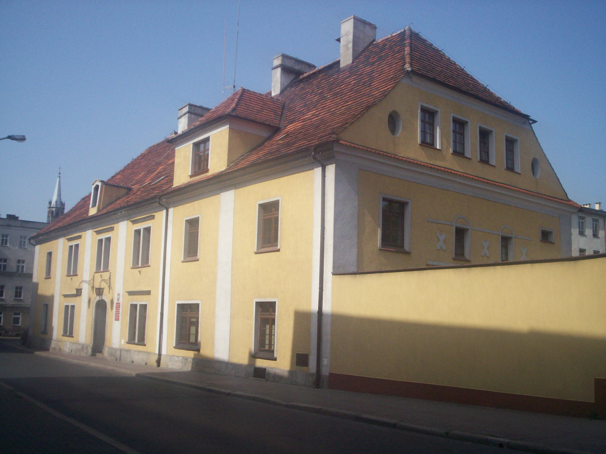 Bolesławiec, Urząd Gminy, dawniej wchodził w skład kompleksu klasztoru dominikanów.